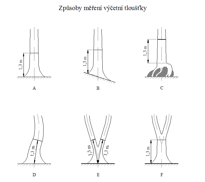 Měření výčetní tloušťky